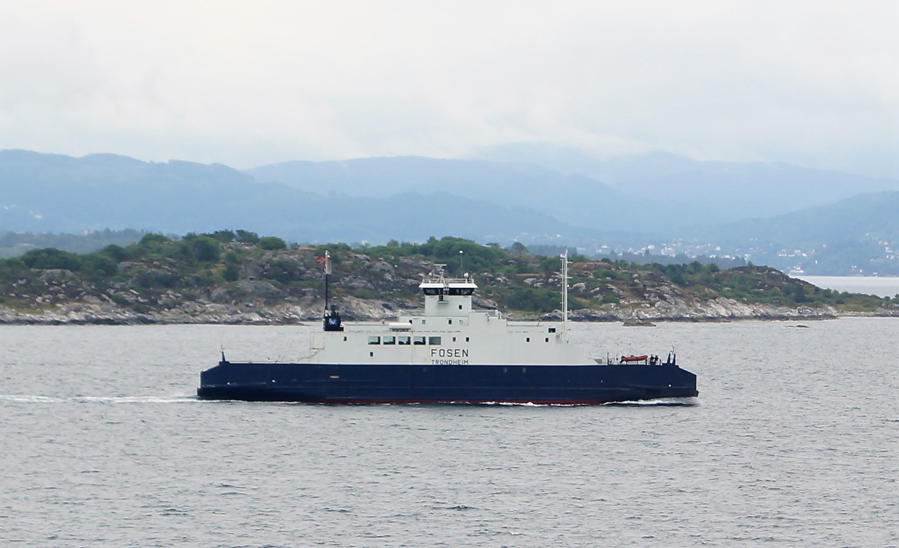 «Fosen» i Korsfjorden